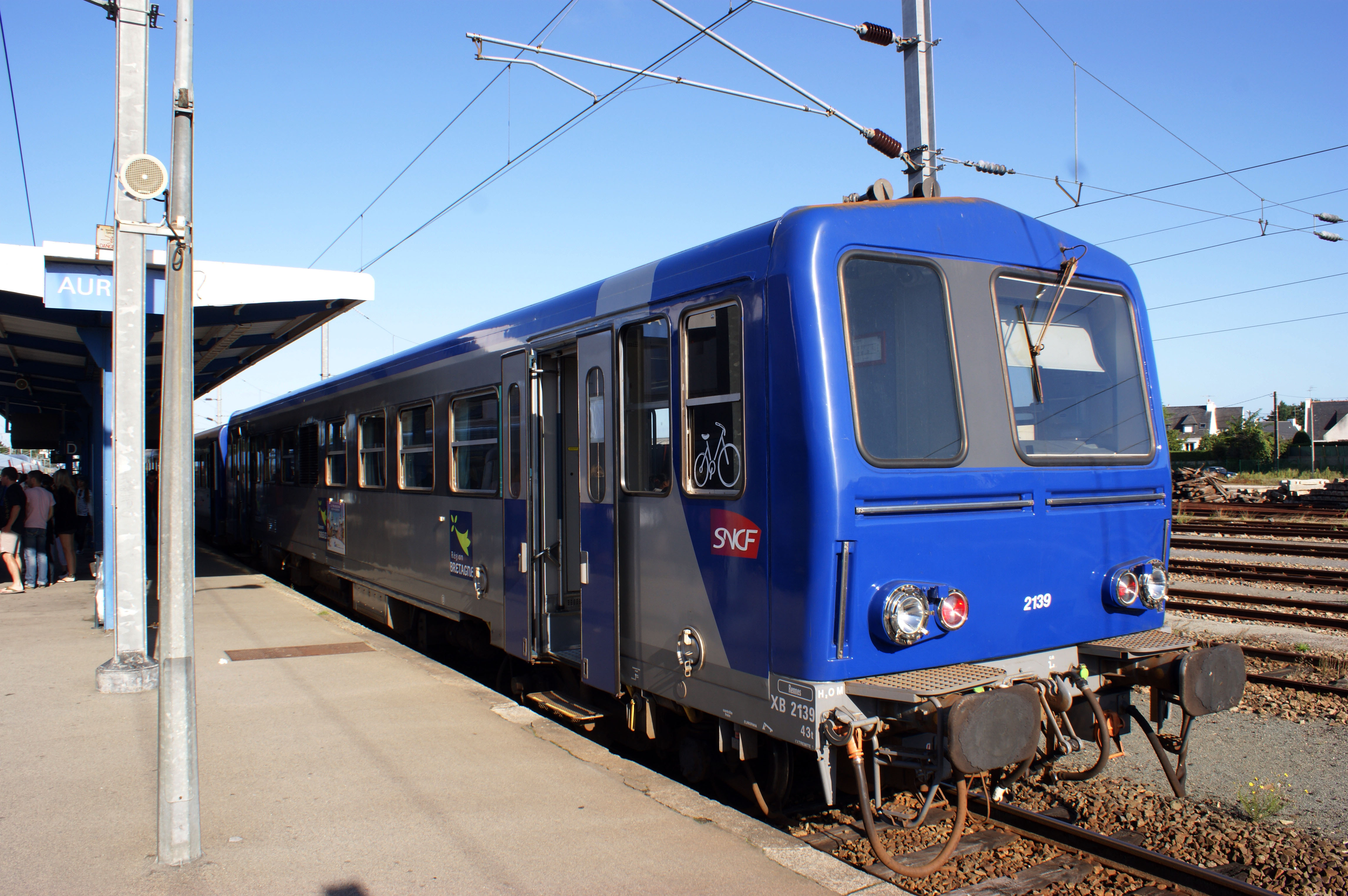 Le Tirebouchon à quai en gare d'Auray en 2011